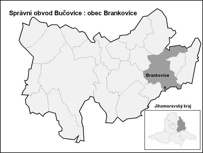 Hranice Brankovice (Vyškov-(Bučovice)- Czech republic)